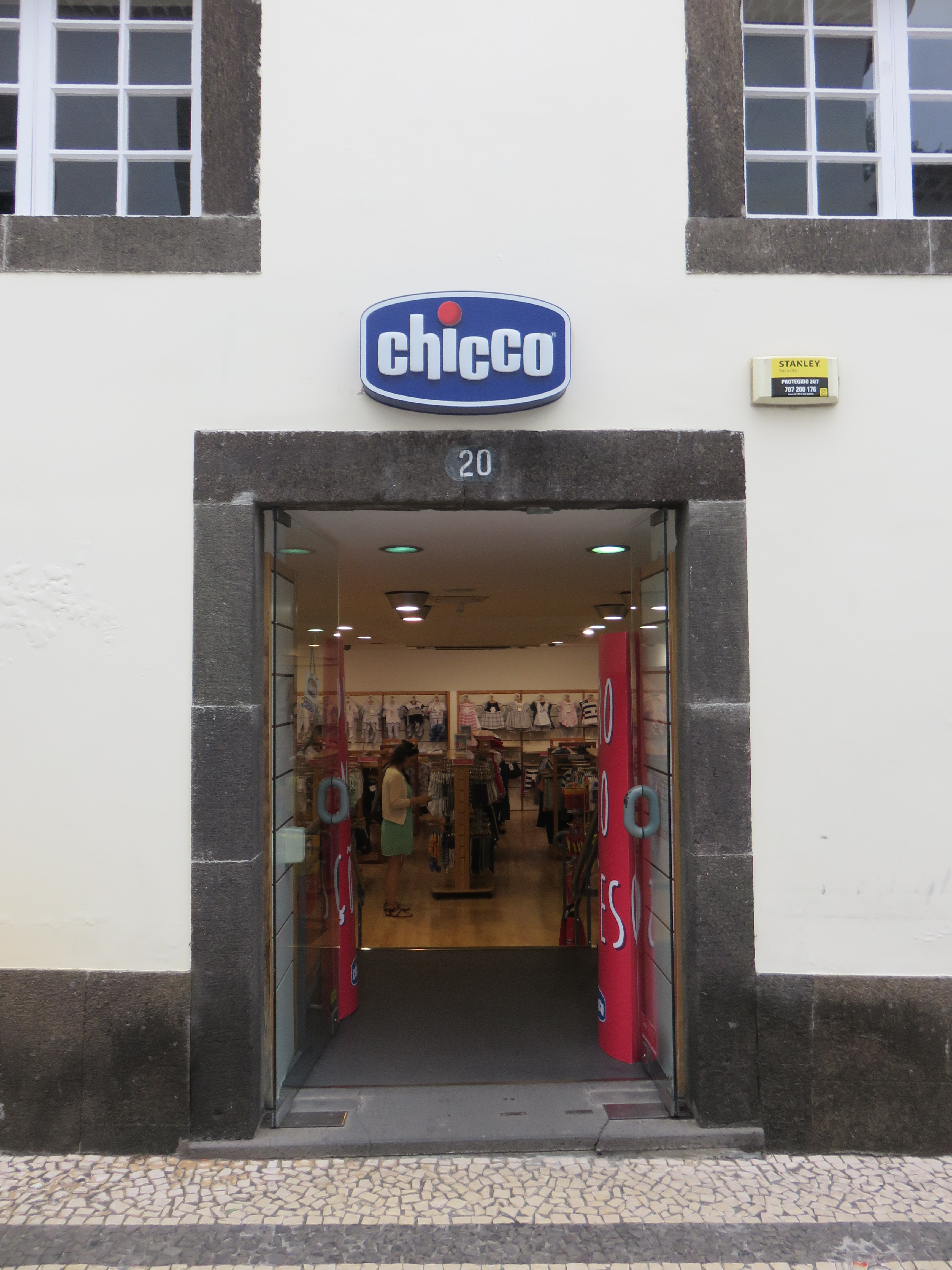 Palácio dos Ornelas - palácio no Funchal, Madeira, Portugal Cultural property Palácio dos Ornelas, Sé, Funchal, Madeira, Portugal Q66816021, SIPA ID: 6596 Wiki Loves Monuments ID: DRC-M-220310016